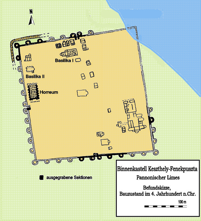 Befunde des spätantiken Binnenkastells von Keszthely-Fenékpuszta (HU), Pannonischer Limes, 4. Jahrhundert n. Chr.